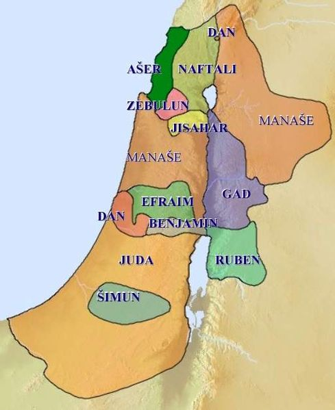 Karta rasporeda 12 izraelskih plemena, kako ga prikazuje Biblija. Pleme Dan nije nikad prebivalo na svome južnom području koje je ostalo u vlasti Filistejaca. Plemena istočno od rijeke Jordana teško da su u stvarnosti ikad imala vlast nad tim područjem.